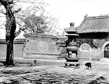 photo from Ein Tagebuch in Bildern